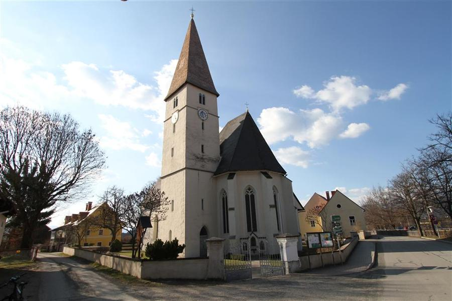 Kath. Pfarrkirche hl. Lambert, Friedhof